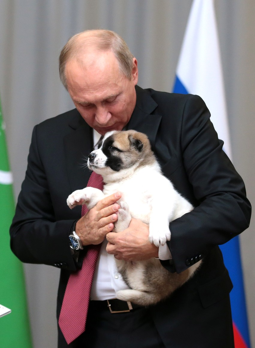 Президент Туркменистана Гурбангулы Бердымухамедов подарил Владимиру Путину щенка алабая по кличке Верный